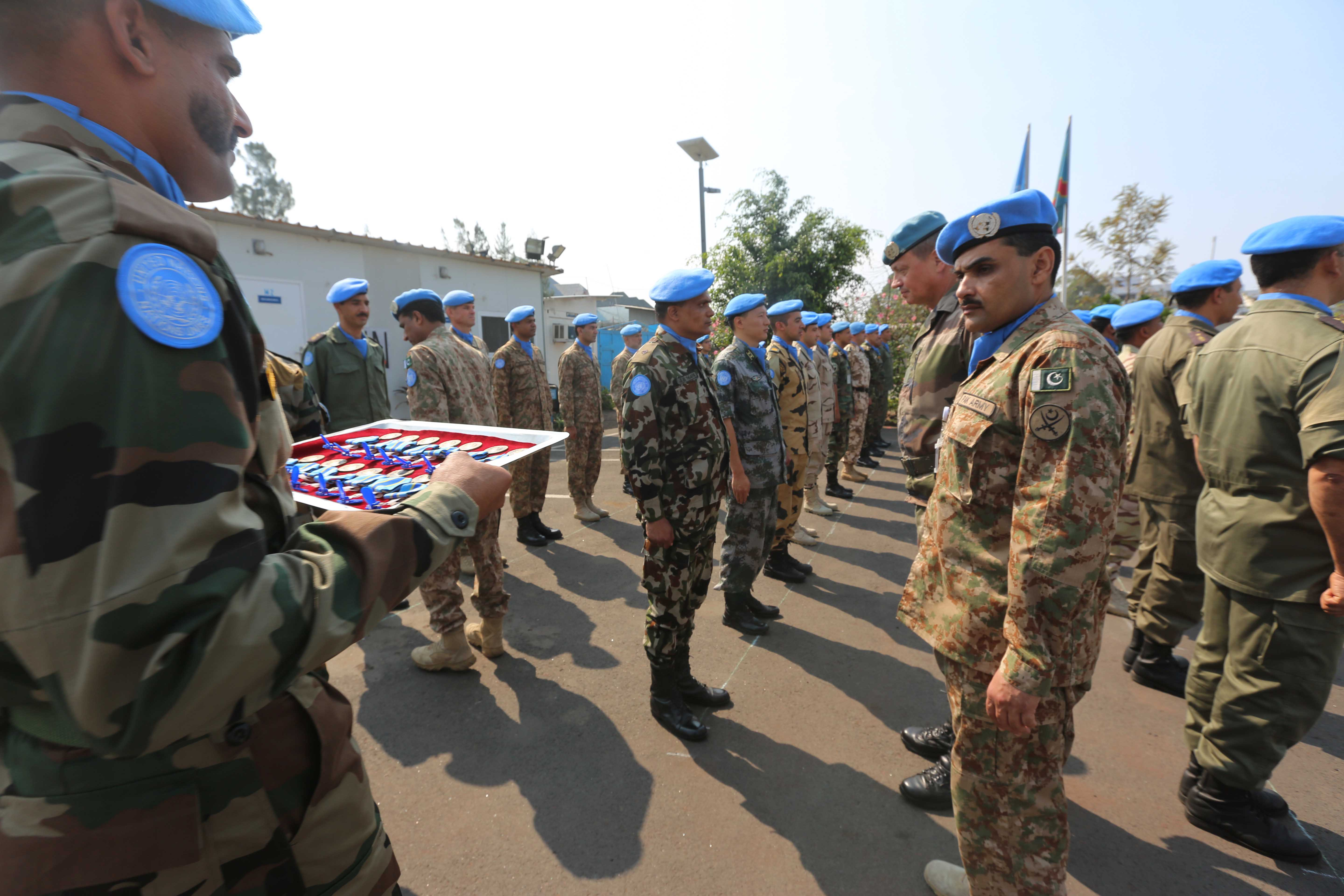 Goma, RD Congo: 25 officiers et 4 adjudants issus de divers pays contributeurs de troupes ont été décorés de la Médaille des Nations Unies pour leur participation à des opérations internationales militaires et policières conjointes, tels que des efforts de maintien de la paix ou humanitaires ou encore de secours aux sinistrés. Photo Monusco/Myriam Asmani == Goma, DR Congo: 25 Officers and 4 Warrant officers from various troop-contributing countries were awarded the UN Medal for participating in joint international military and police operations such as peacekeeping, humanitarian and disaster relief efforts. Photo MONUSCO/Myriam Asmani